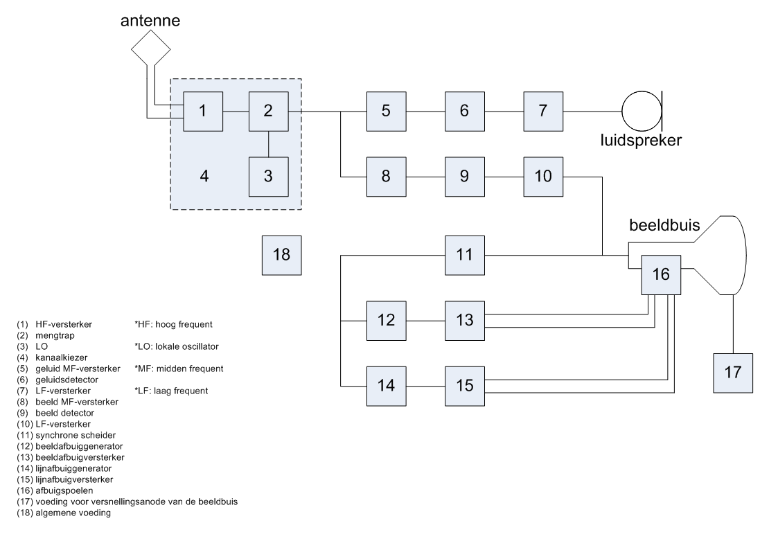 blokschema voor opbouw van zwart-wit televisie met antenne als ontvanger